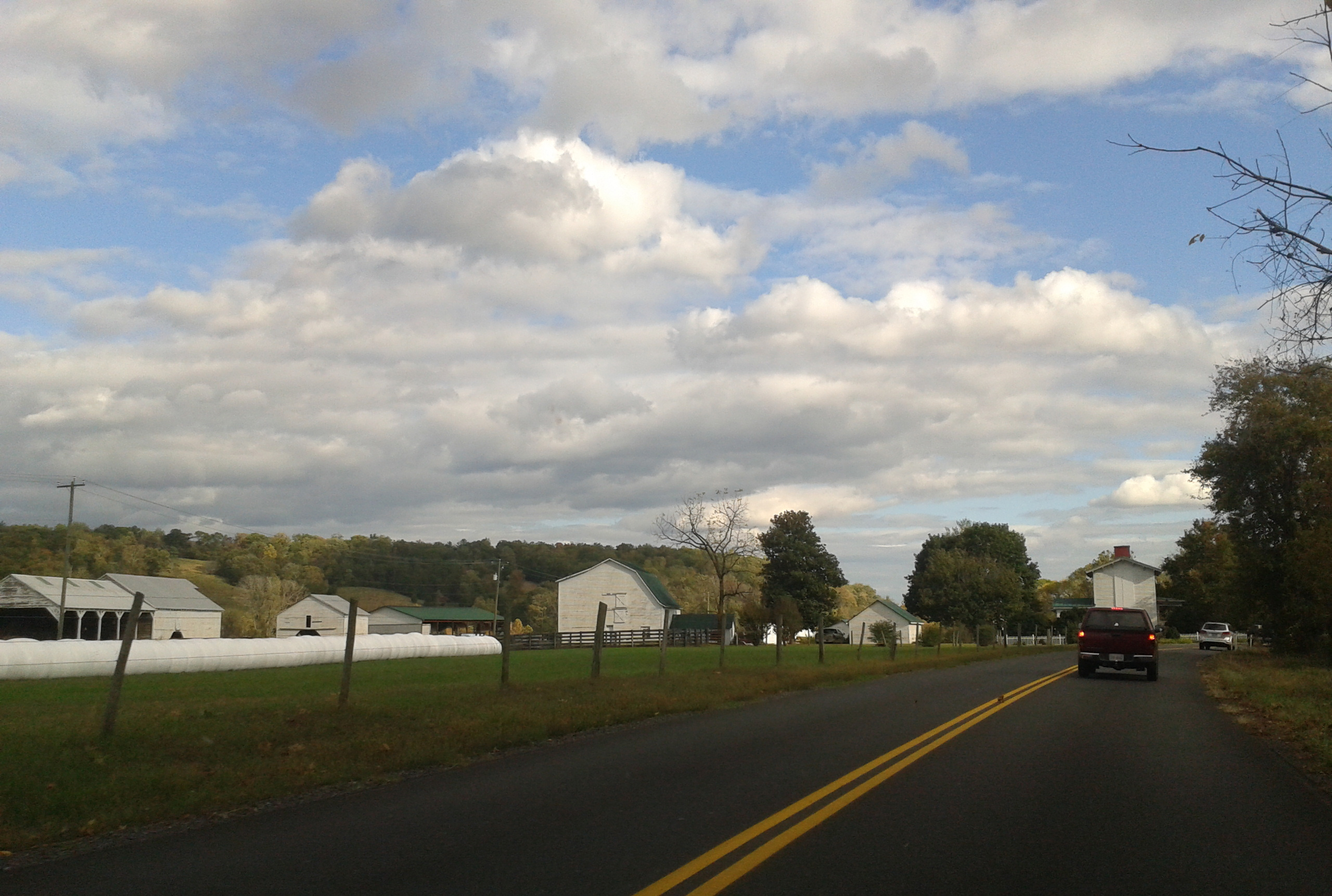 Farm in Criglersville, Virginia